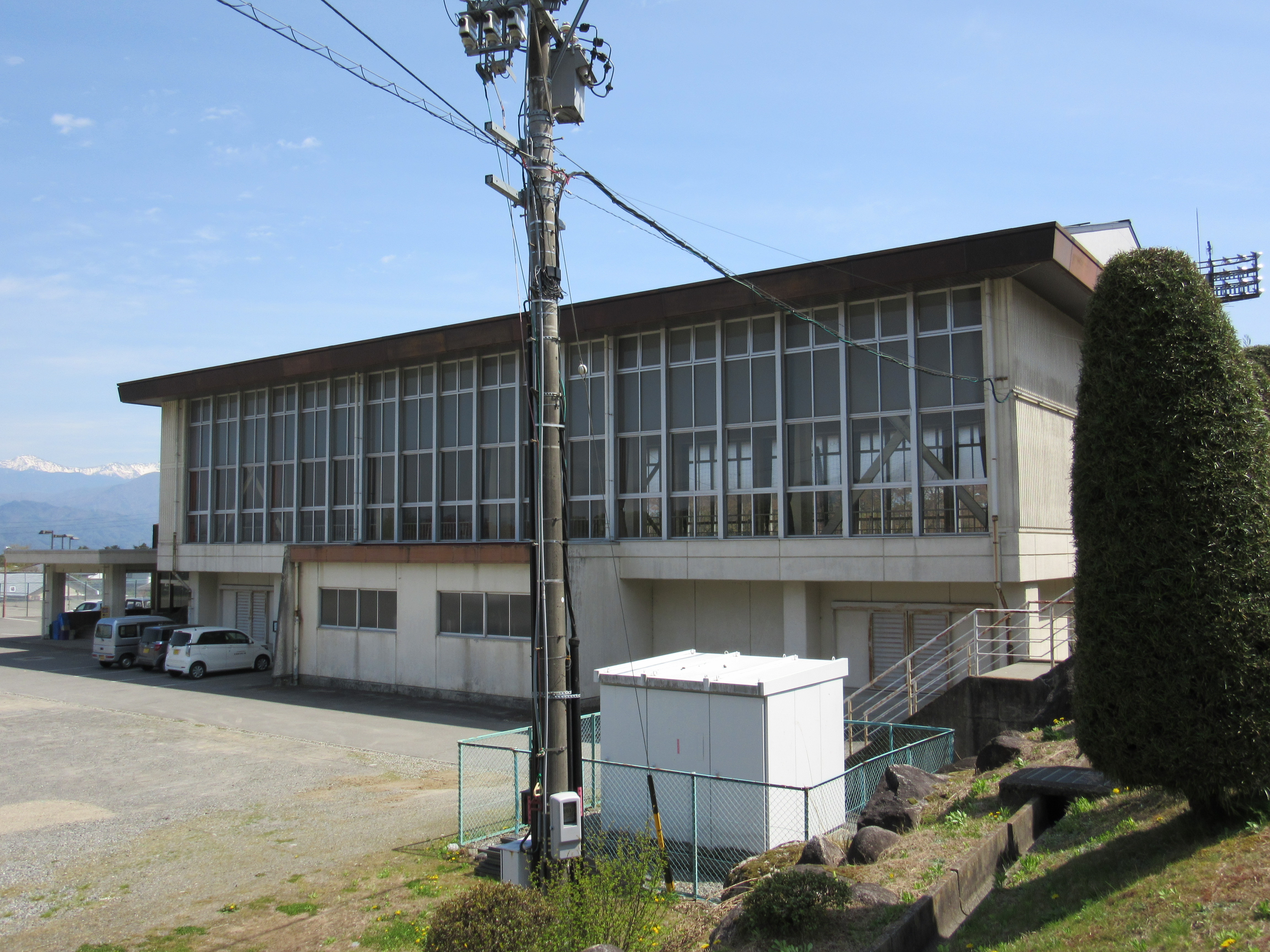 宮田村農業者トレーニングセンター